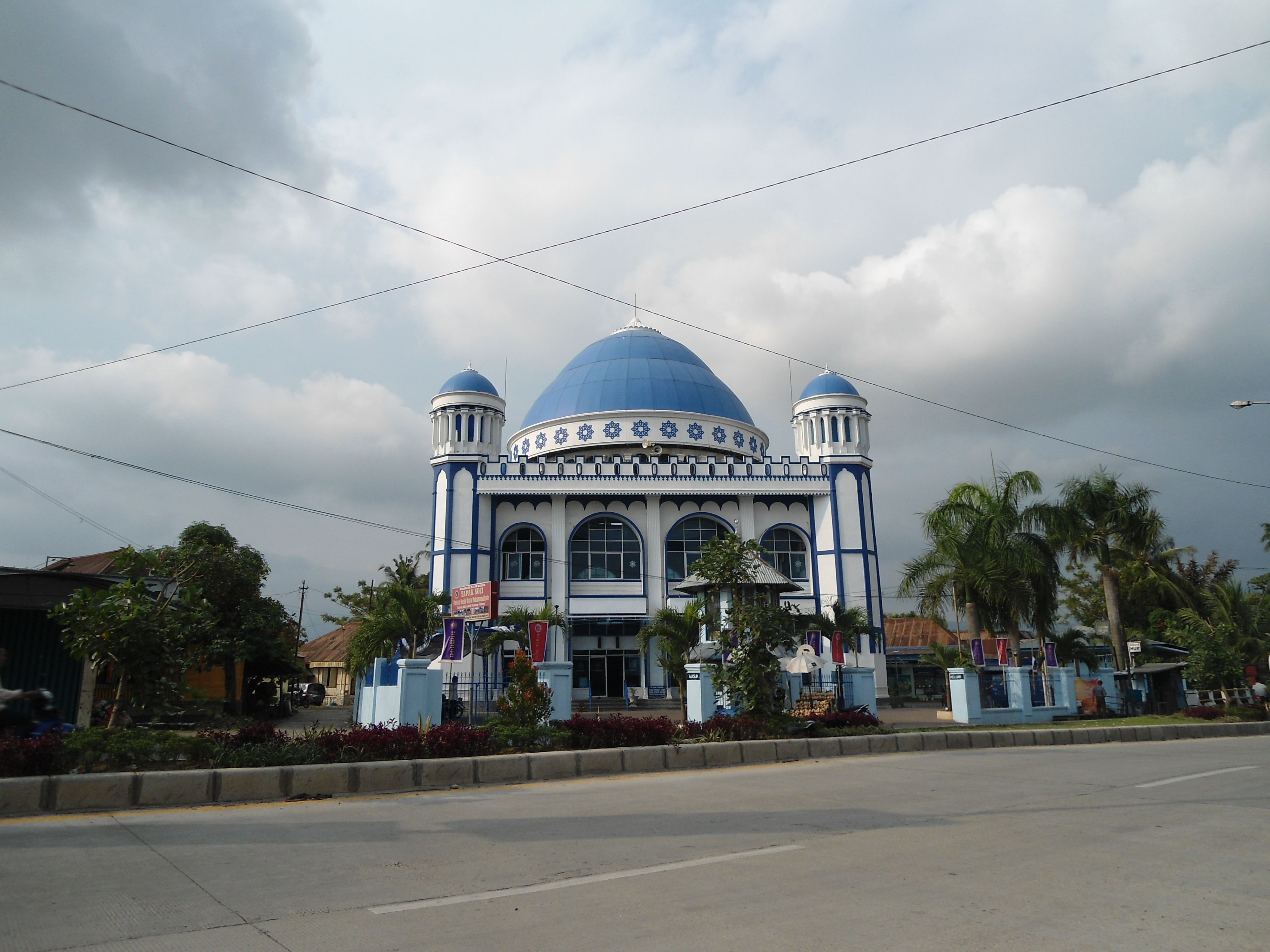 Masjid Raya Muhammadiyah Tanjung Sabar di Kota Padang, Sumatera Barat, Indonesia